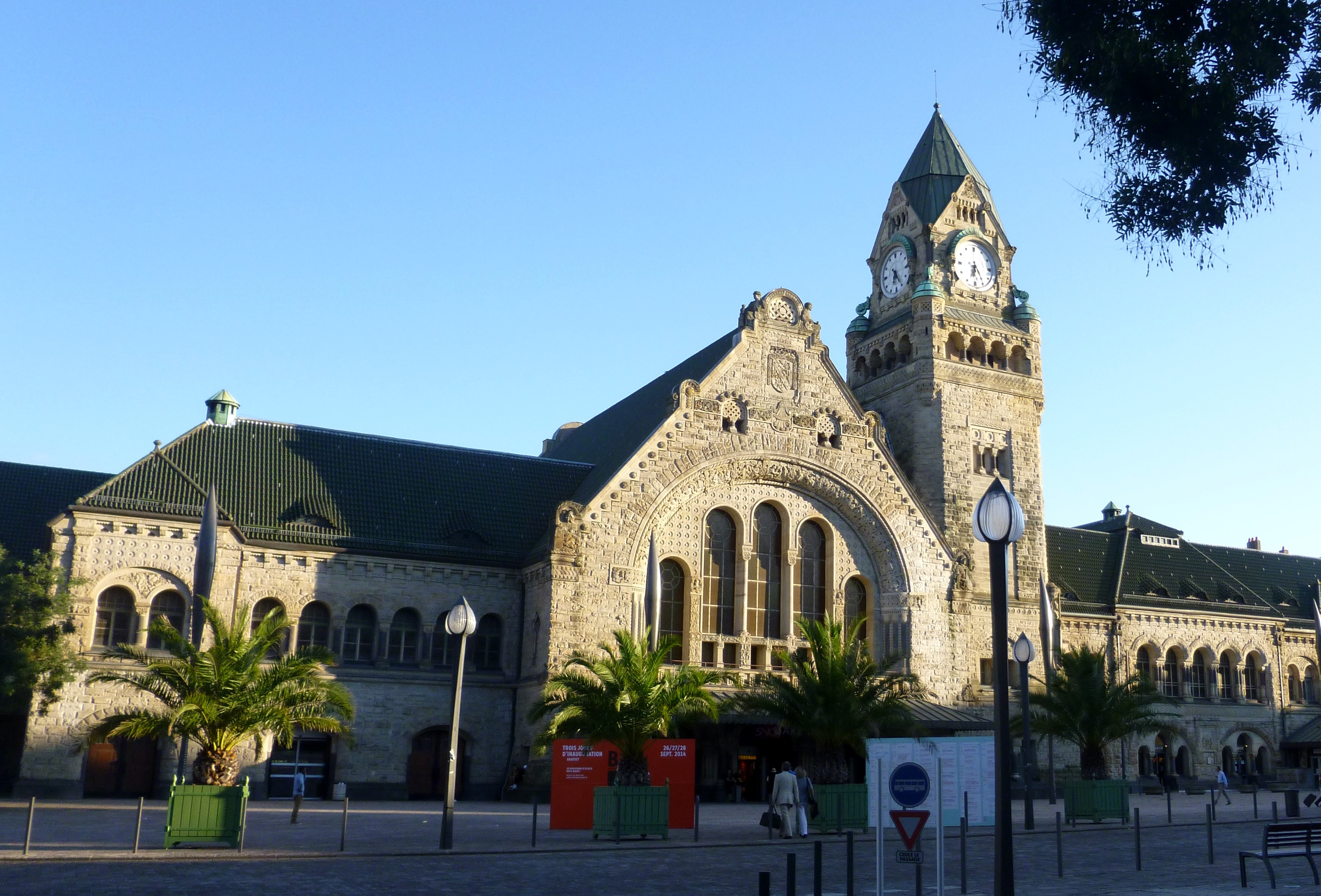 Gare de Metz-Ville .